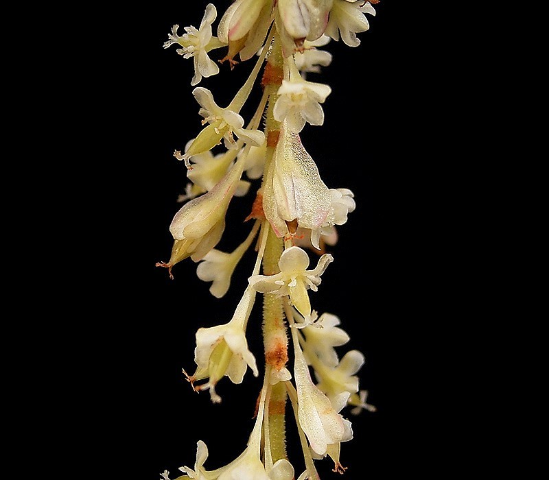 Fallopia japonica